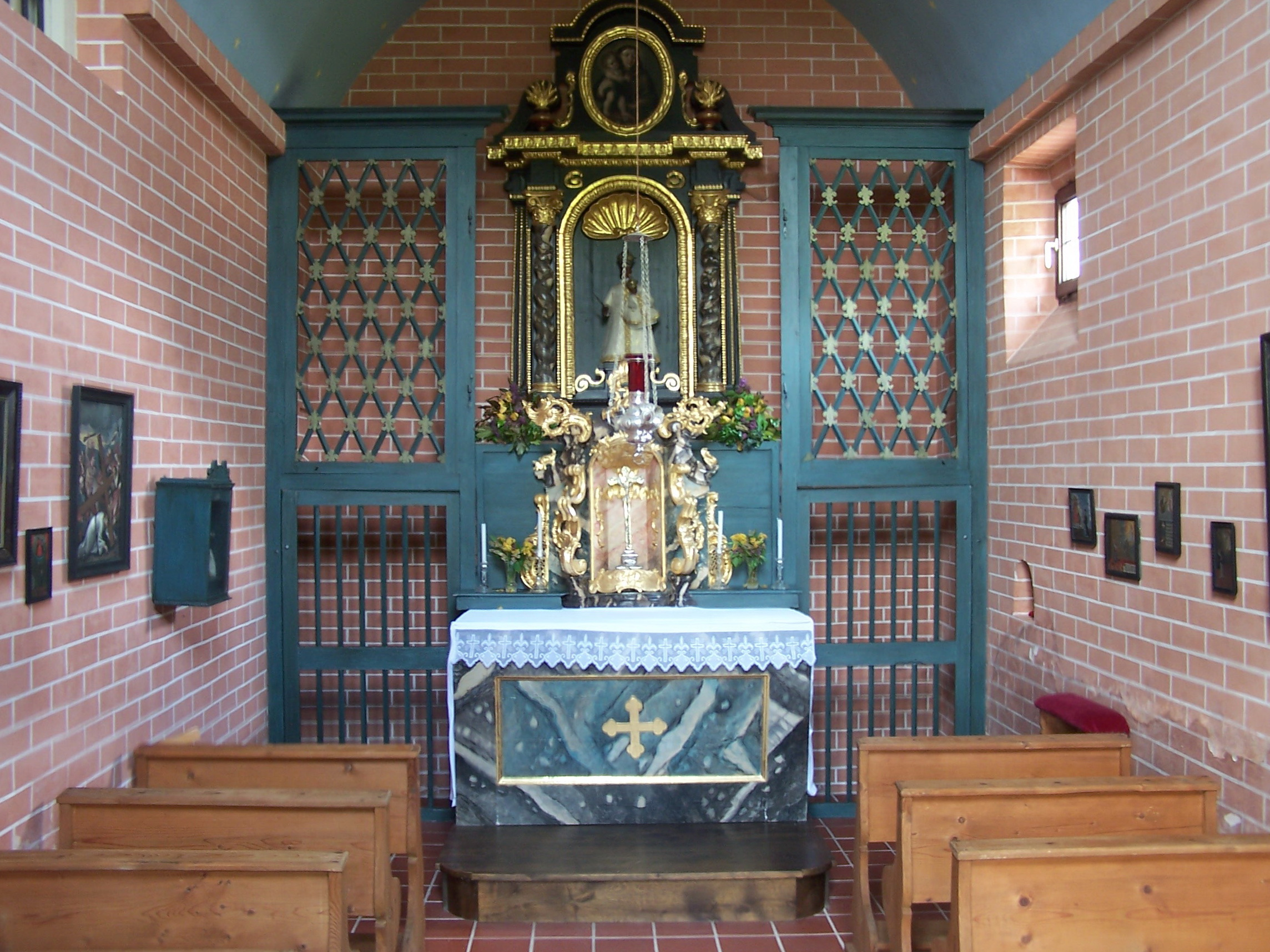 Rohr, Lorettostraße. Lorettokapelle Unserer Lieben Frau, 2. Hälfte 17. Jahrhundert; mit Ausstattung; anstoßende Klause, erbaut 1735. Das Tonnengewölbe des Innenraums ist mit Klinkern verkleidet. Der kleine Altar mit zwei gewundenen Säulen steht hinter einer Gitterwand. Eine schwarze Marienfigur mit Jesuskind und Zepter befindet sich in einer Muschelnische; im Aufzug zwischen Gebälkvasen ein Ovalbild des St. Antonius von Padua; auf der Mensa ein Tabernakel mit Kreuz; seitlich Rokoko-Voluten mit Rank- und Gitterwerk.